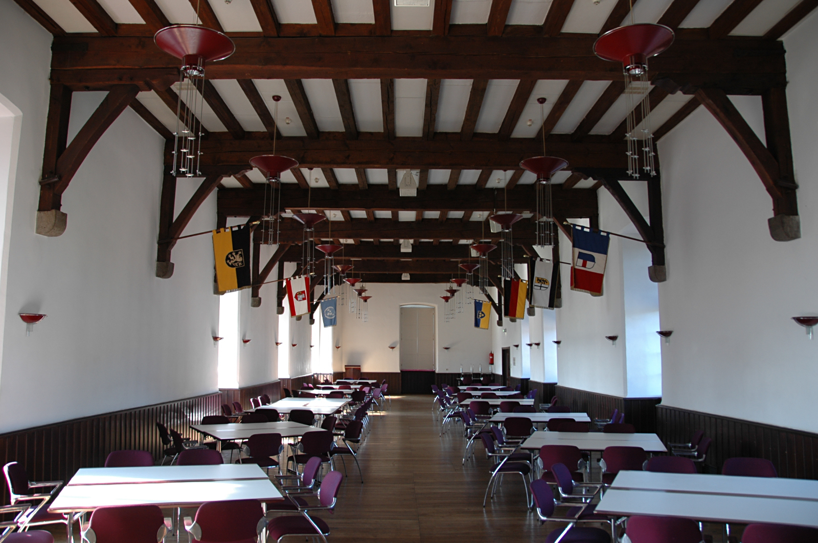 Altes Schloss in Grevenbroich, Rittersaal